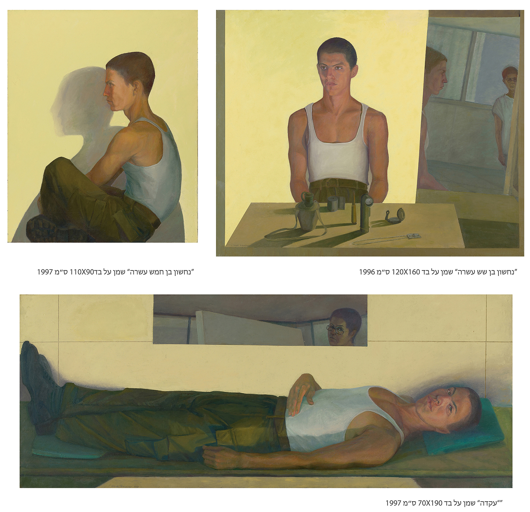 חוה ראוכר, "עקדה " שמן על בד, סדרה של שלושה ציורים 1996-1997, צילום: אבי אמסלם Hava Raucher, The Sacrifice, Oil on canvas a series of three paintings from 1996 to 1997